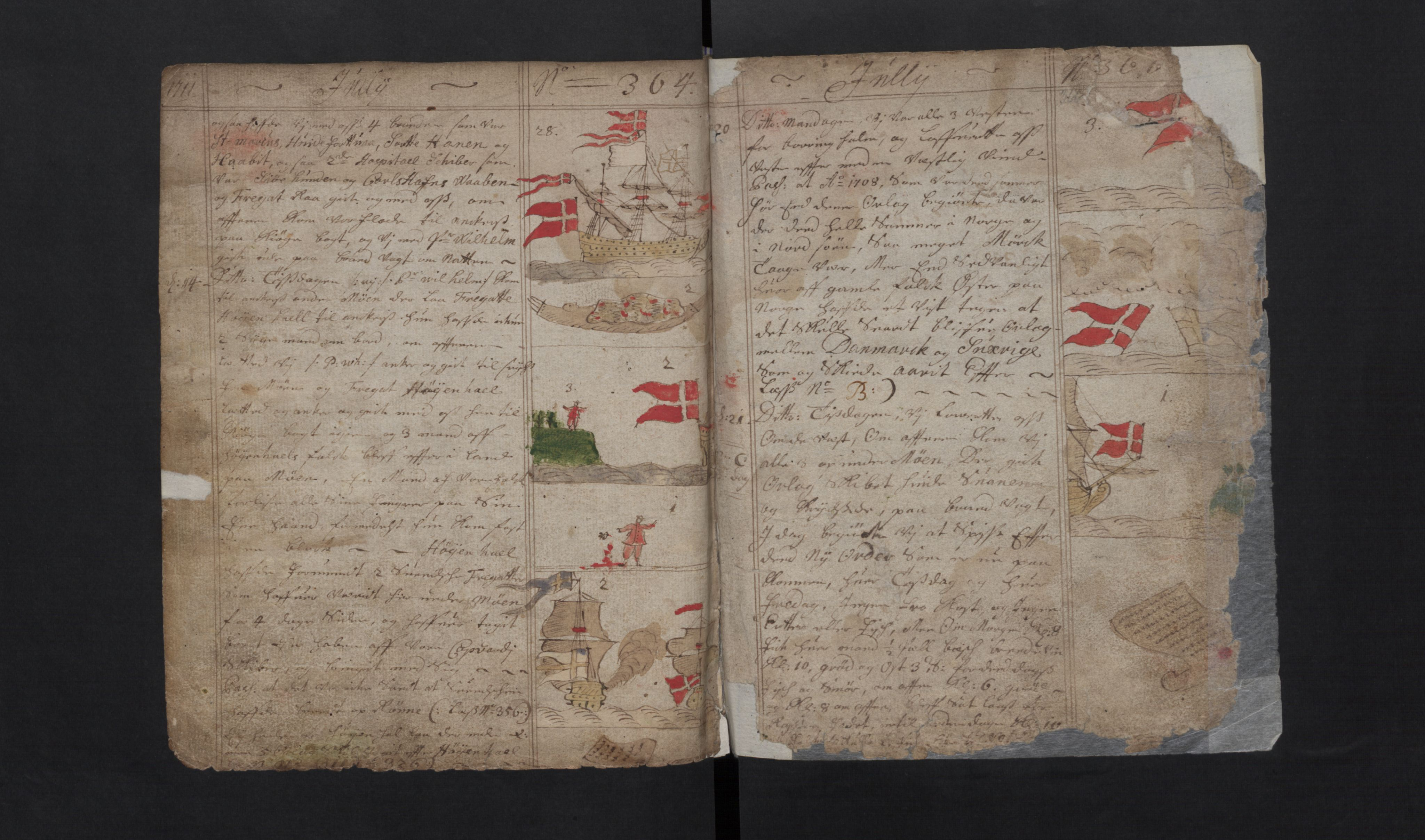 Originale sider, Norske Riksarkivet.